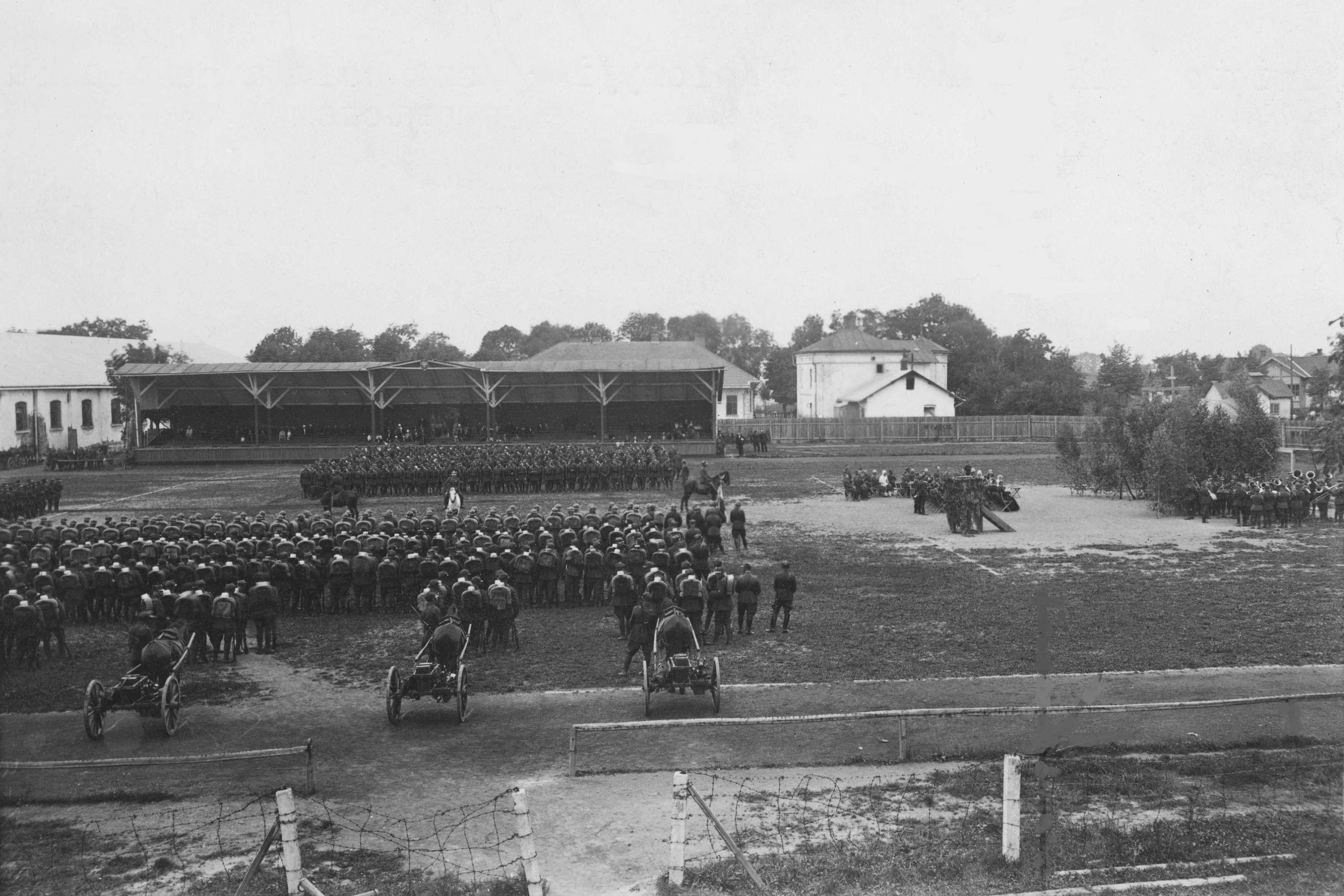 Święto 49 pułku piechoty w Kołomyi - msza polowa na stadionie pułku; 1927 r. Koncern Ilustrowany Kurier Codzienny - Archiwum Ilustracji. Sygnatura: 1-W-1247